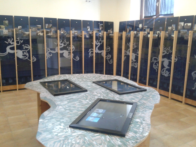 Spazio multimediale